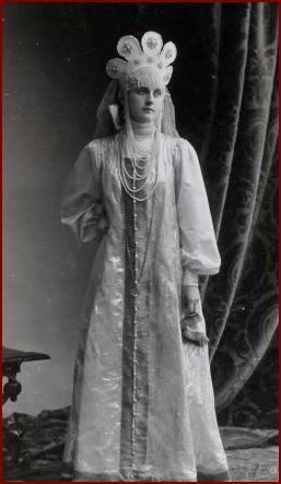 Княжна Елизавета Владимировна Барятинская (1882—1938/48), с 1909 года замужем за П. М. Апраксиным.